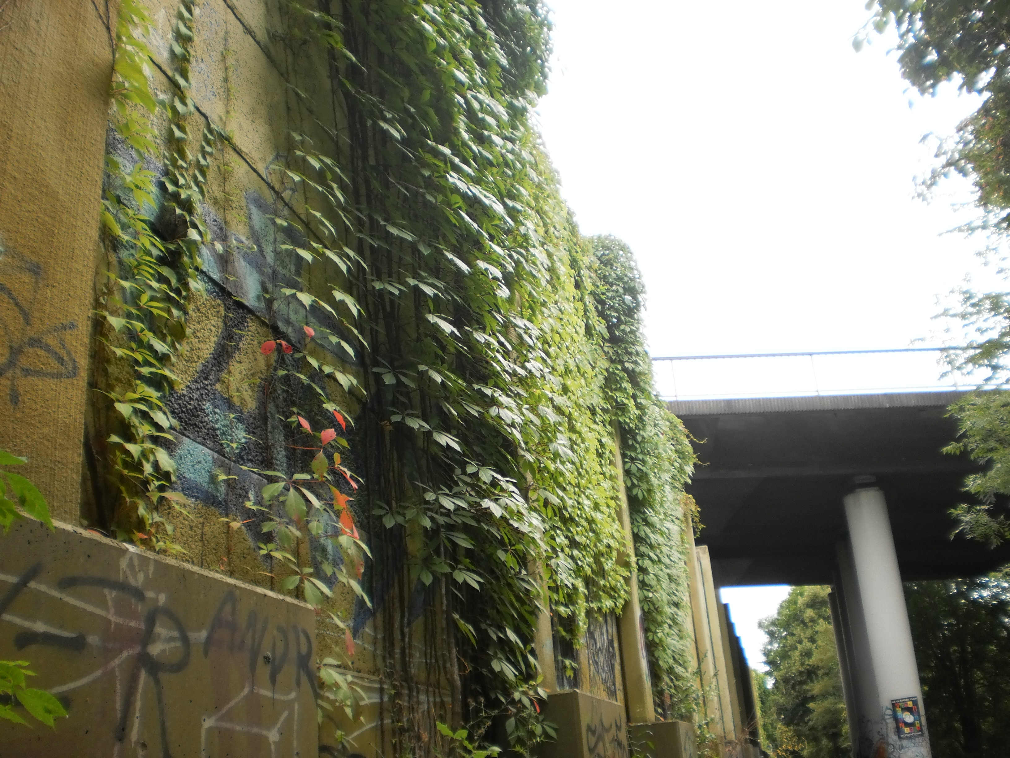 Mit Kletterpflanzen begrünte B3-Lärmschutzwand am Lahntalradweg, welcher hier tief eingeschnitten im Tal unter der Konrad-Adenauer-Brücke Marburg hindurchführt. Gegenüber zur Lahn hin steht eine ↓Tafel des Planetenwegs↓ mit Uranus↓.